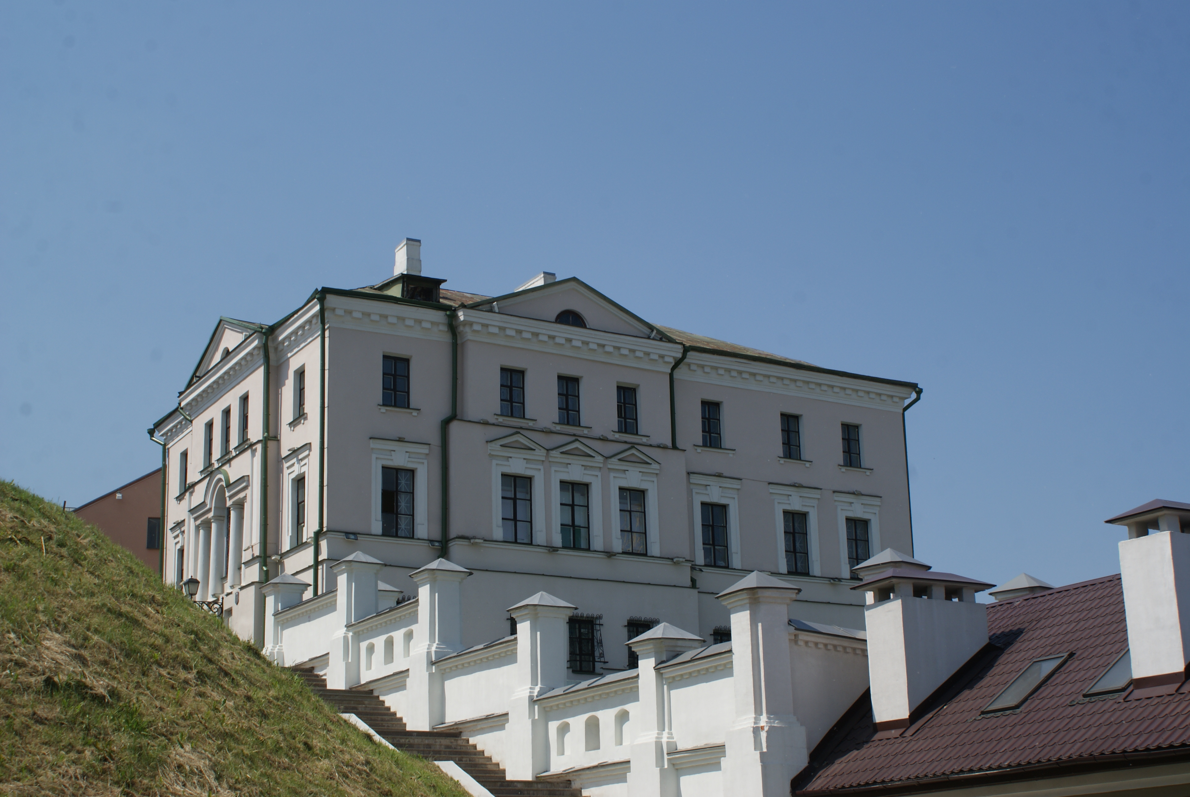 Дзяржаўны музей гісторыі тэатральнай і музычнай культуры Рэспублікі Беларусь